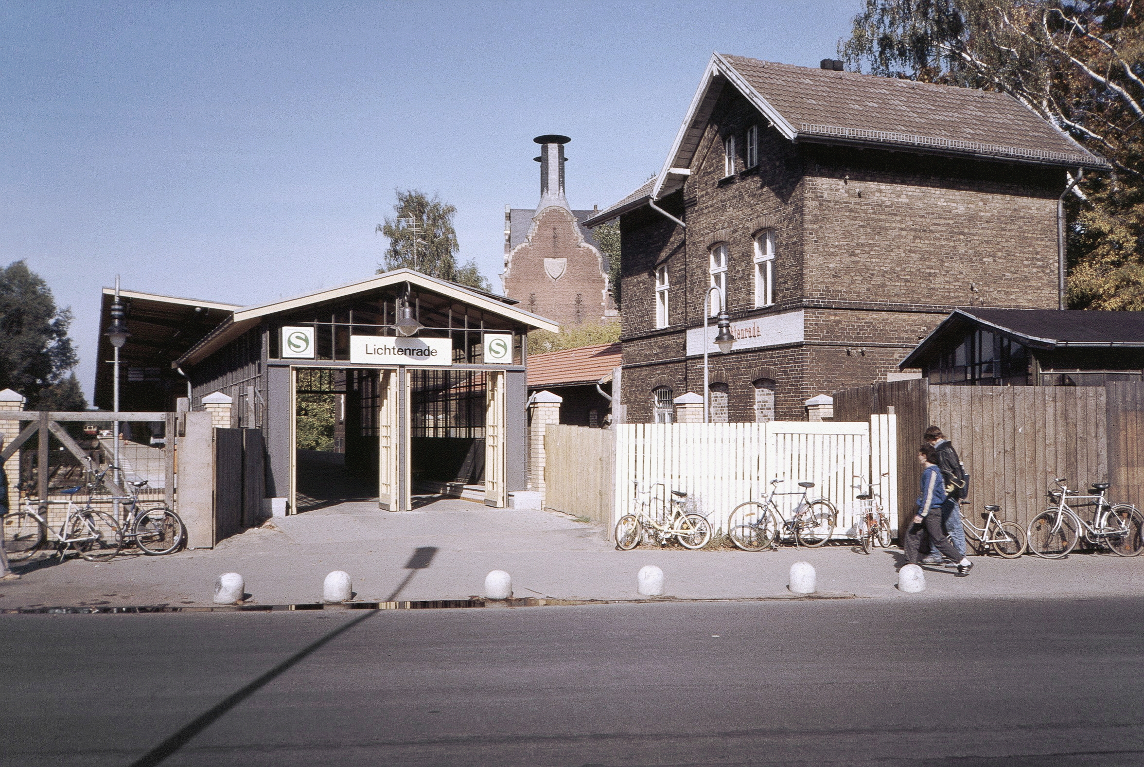 Bahnhof Berlin-Lichtenrade